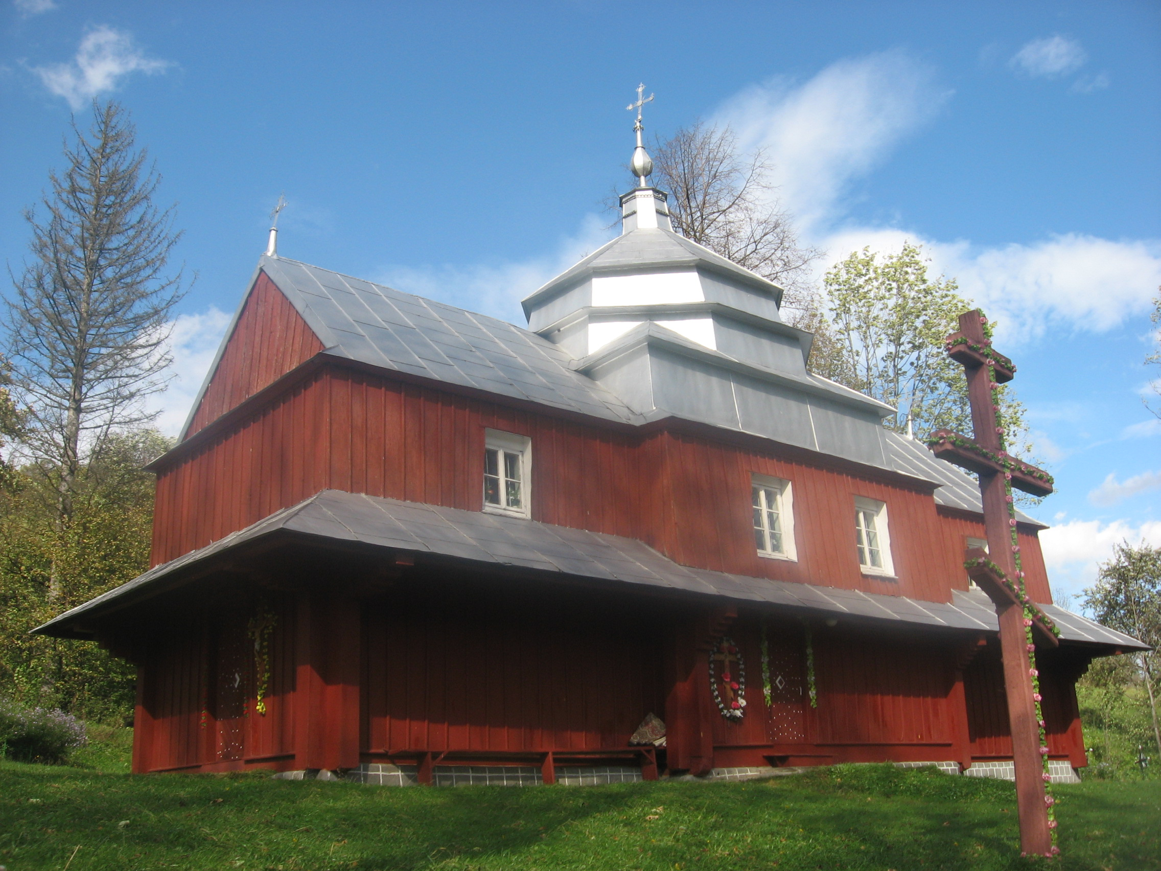 Церква Пр.Трійці 1842 року в Крушельниці